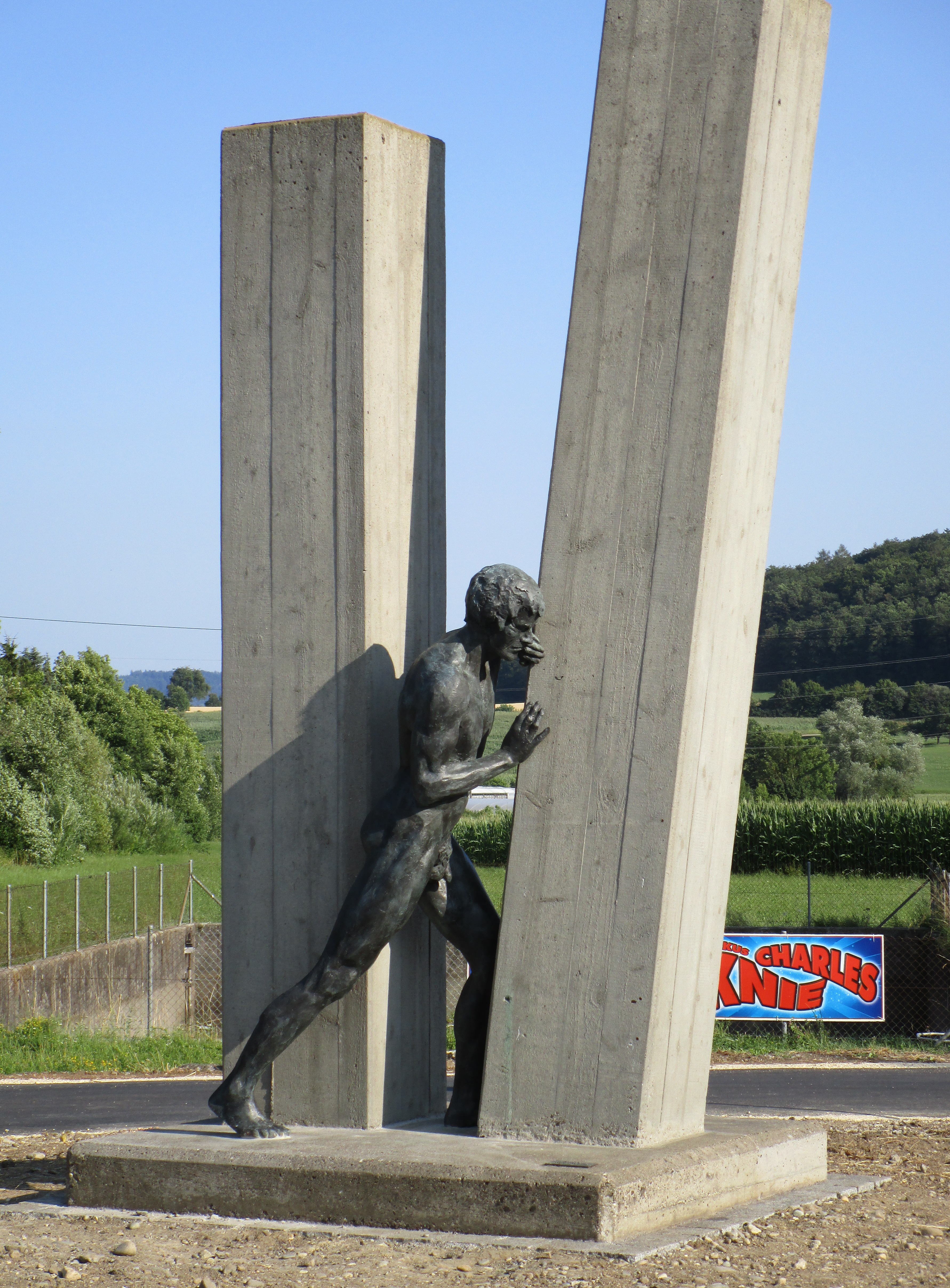 Das Werk stammt von Friedhelm Zilly und entstand im Rahmen des Projekts „Kunst in der Landschaft“ des Landes Baden-Württemberg. Es thematisiert den Konflikt zwischen den widerstreitenden Anforderungen an die Landschaft (Landwirtschaft, Naturschutz, Industrie etc.). Der Autobahnbau in der Gemarkung Hilzingen zeigte diesen Konflikt in besonderer Schärfe.